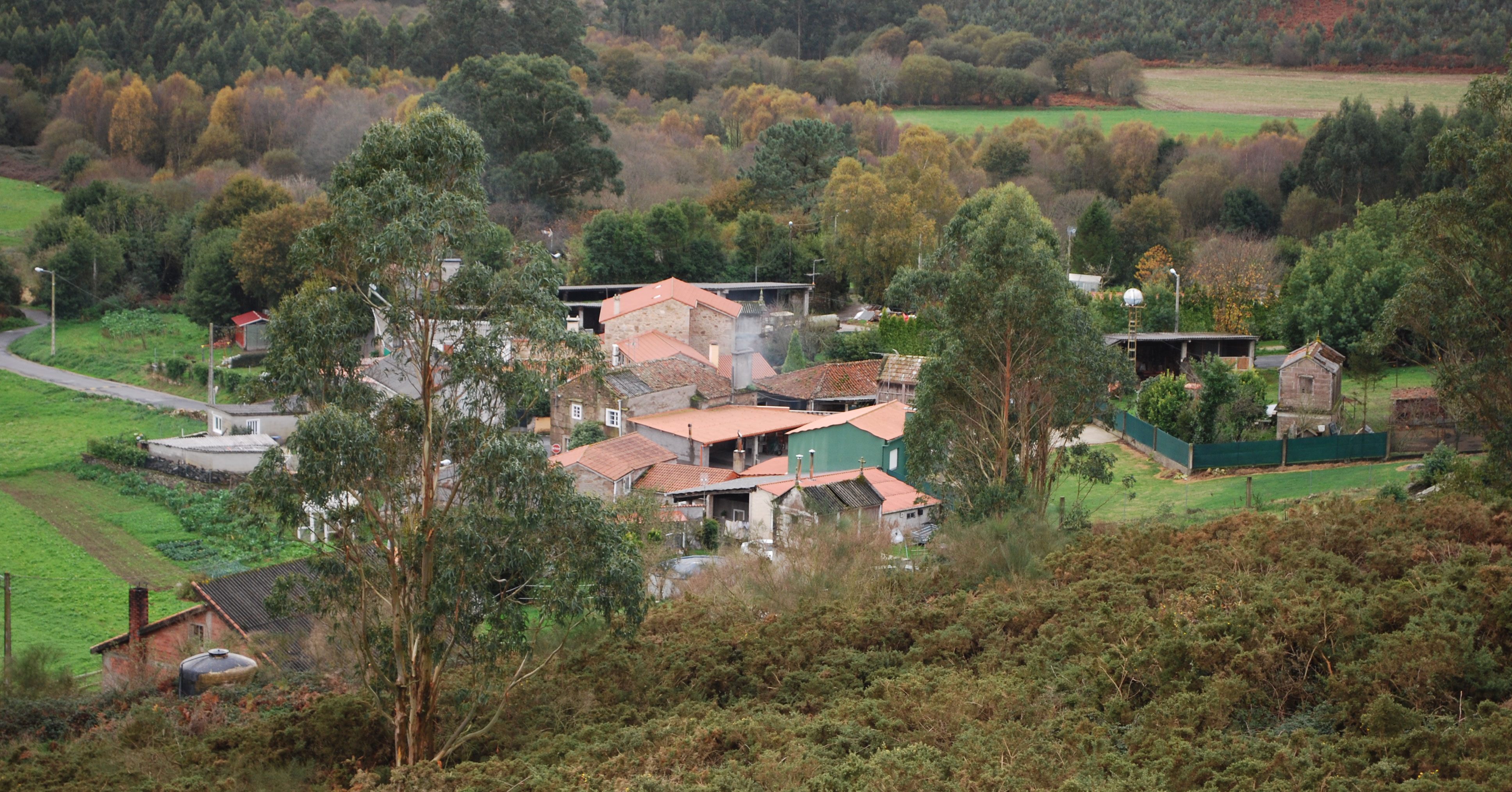 Vista de santa locia arteixo a coruña galiza spain